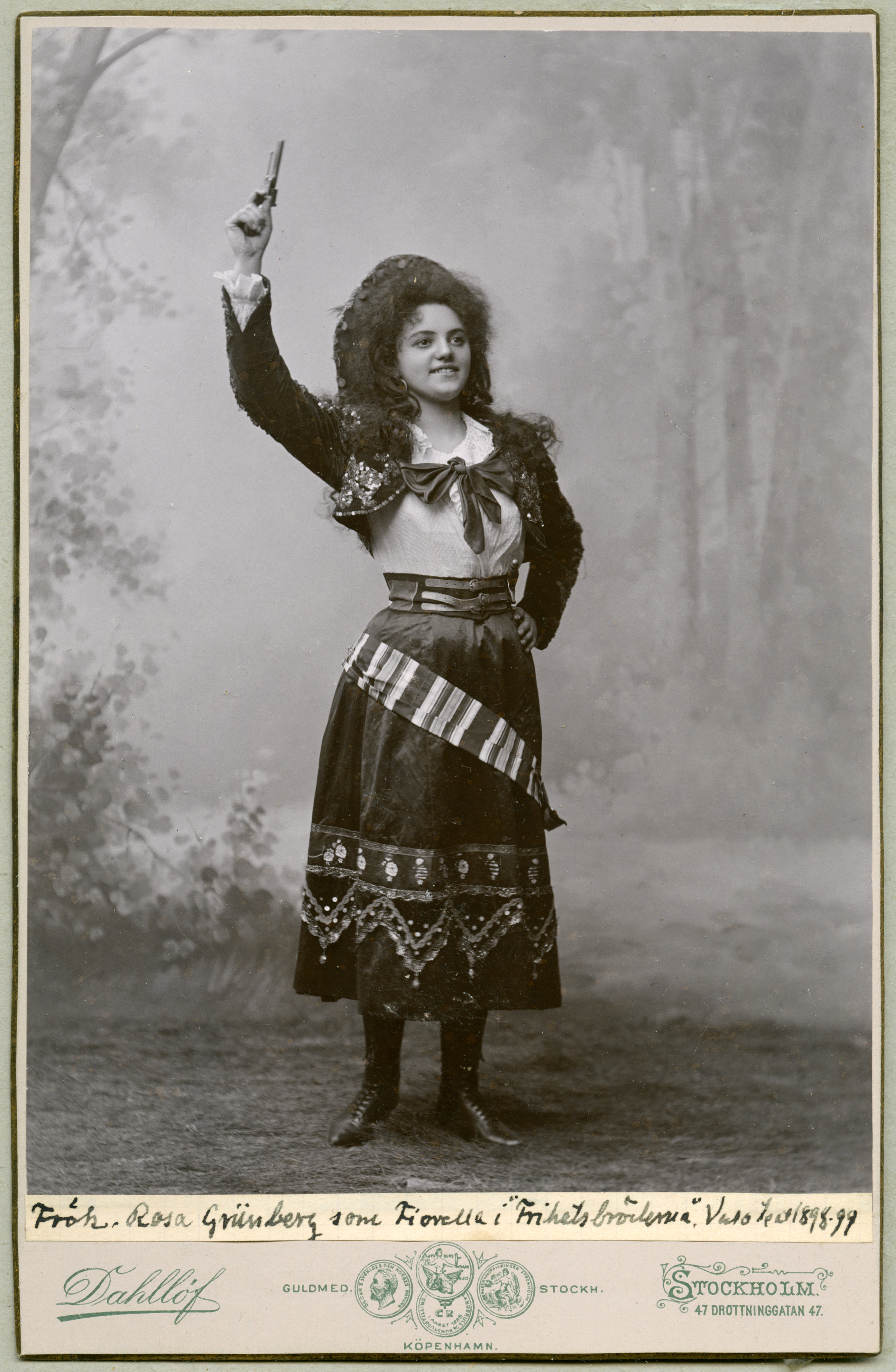 Rosa Grünberg (1878-1969) som Fiorello i Frihetsbröderna på Vasateatern 1898